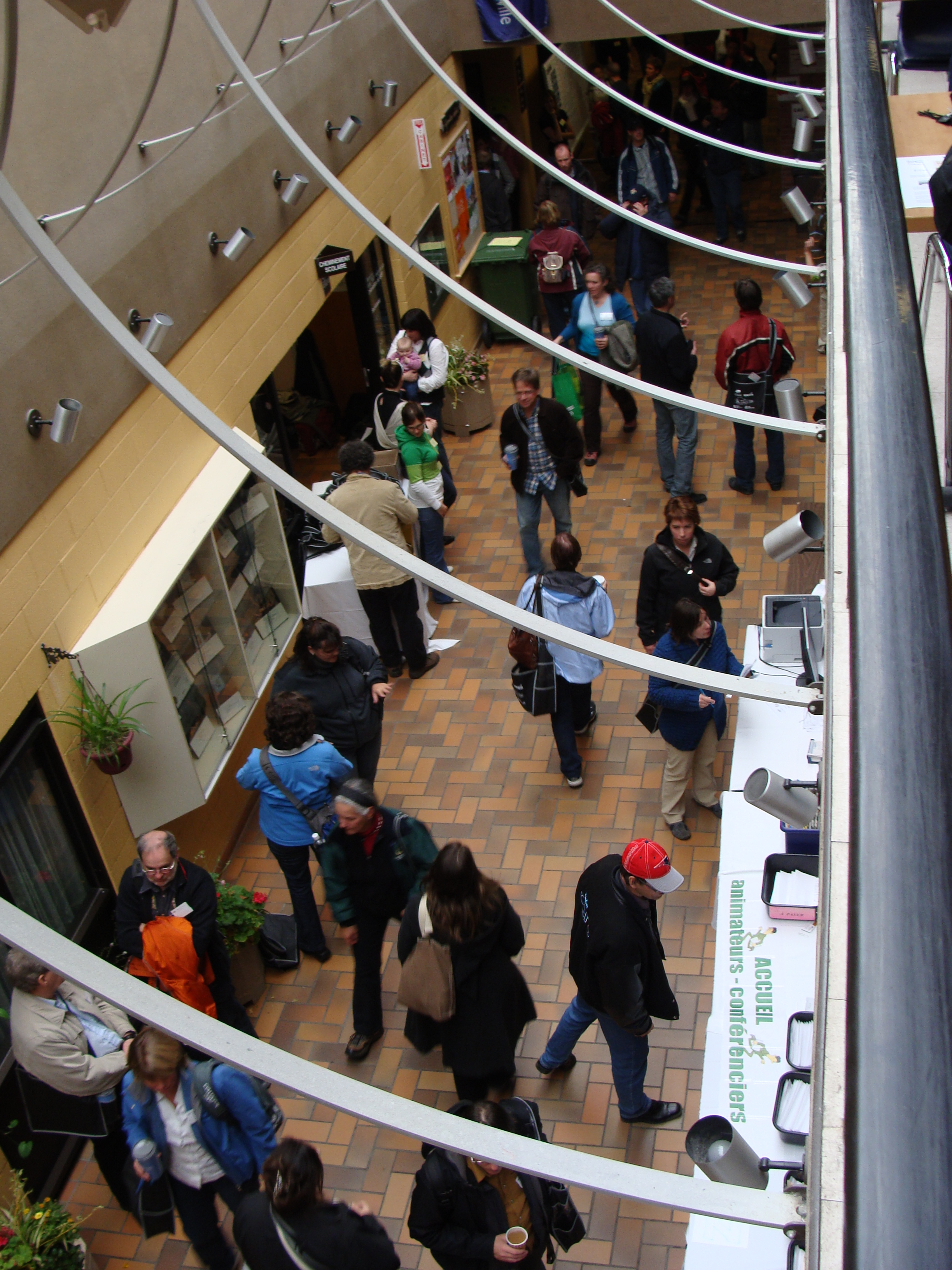 Hall d'entrée du Cégep de Drummondville.